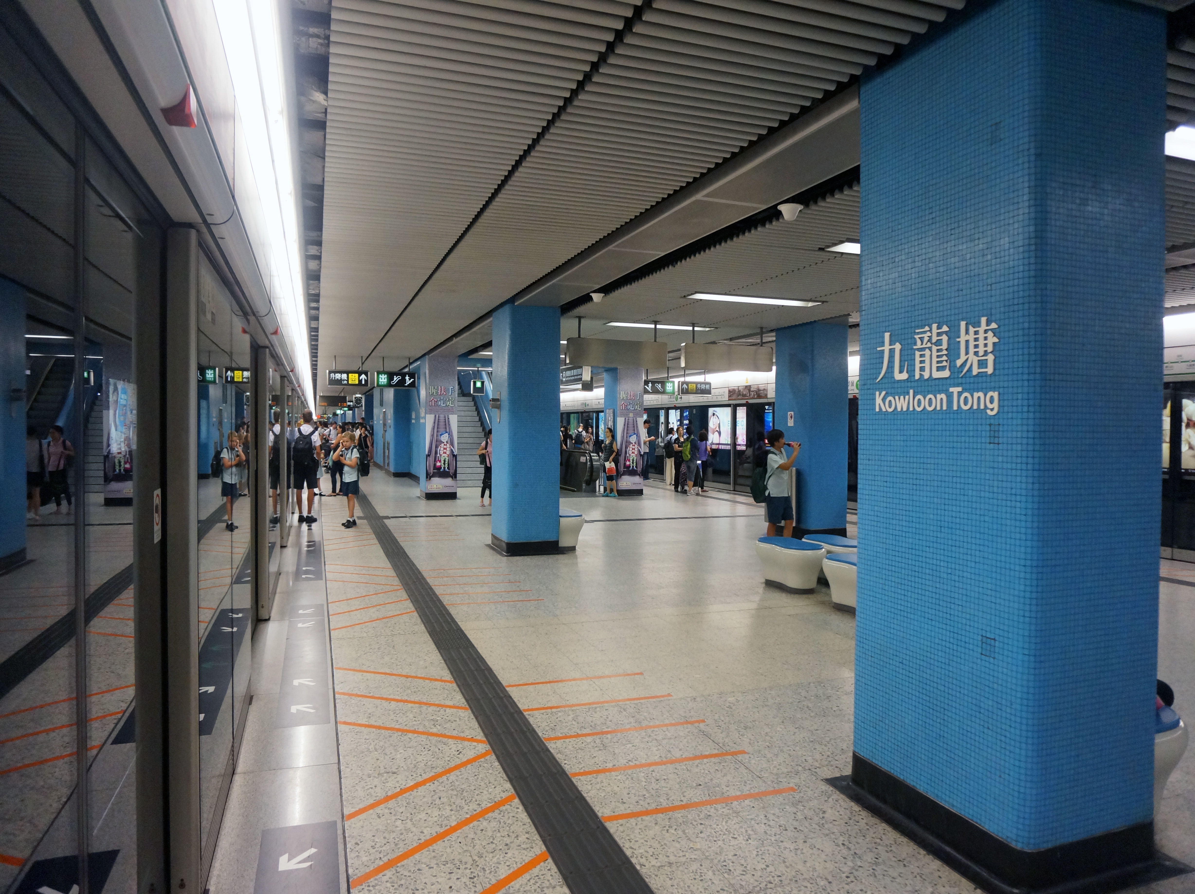 港鐵九龍塘站月台